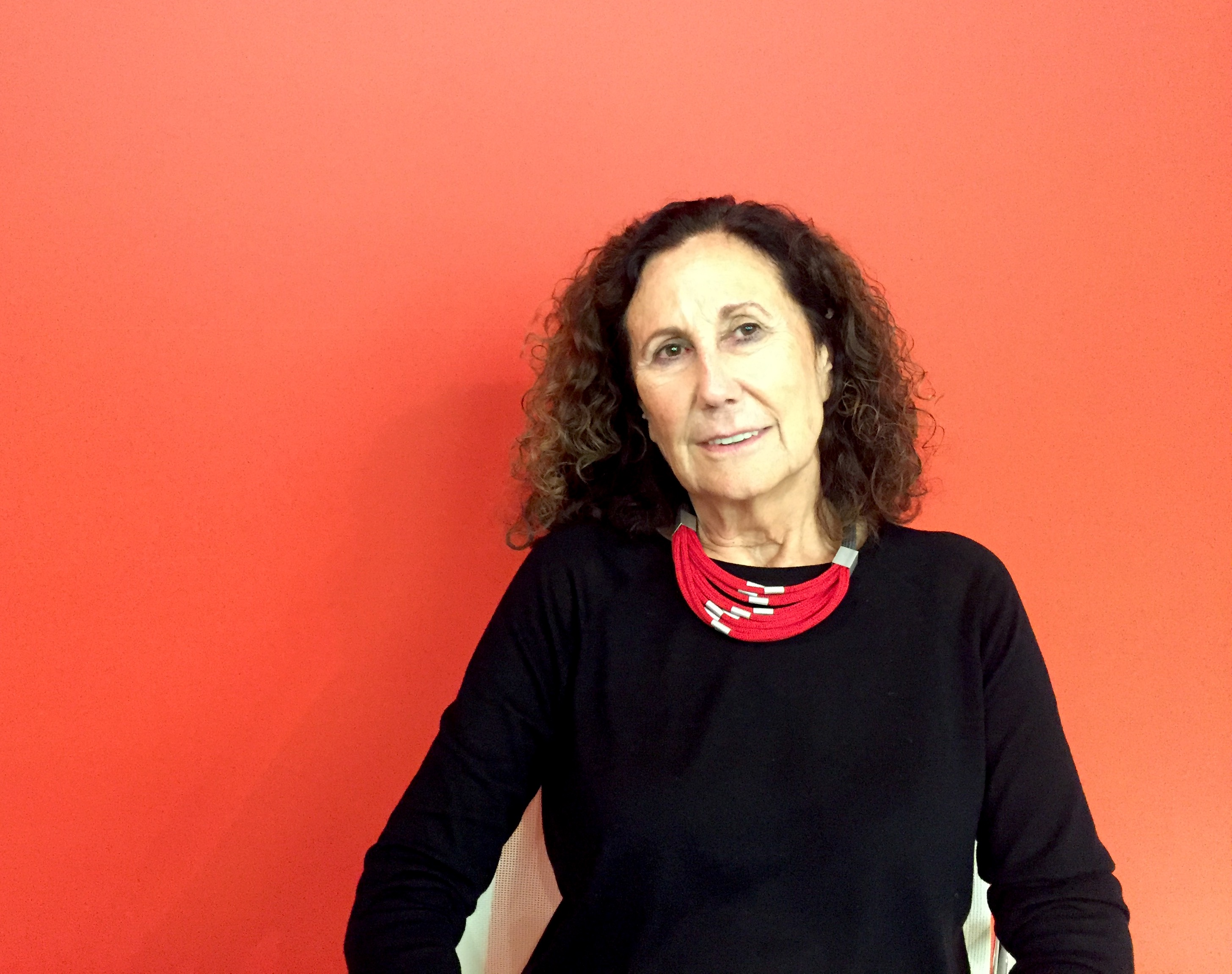 Ponente en el Festival de Videoarte Proyector en la Comunidad de Madrid en el año 2019